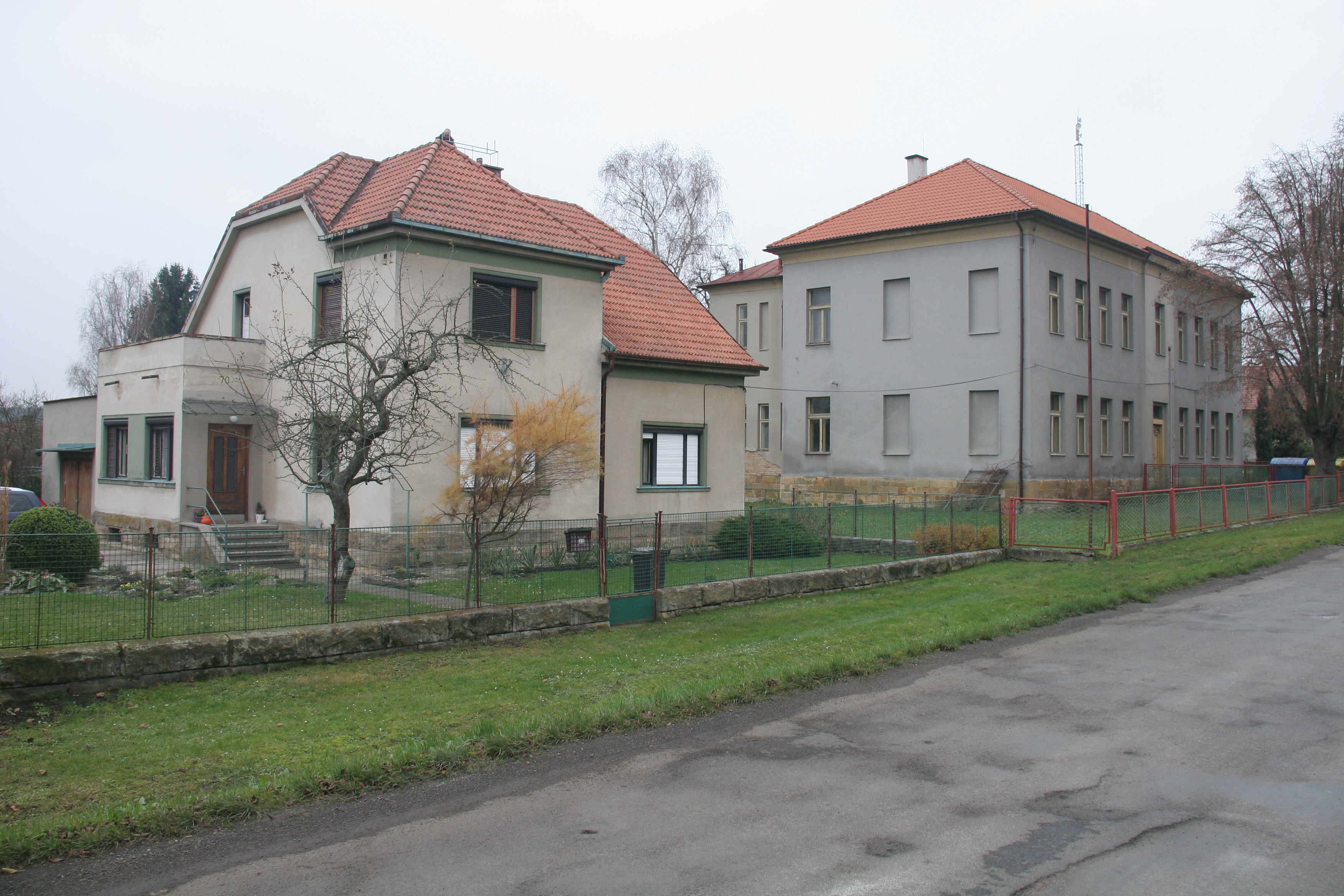 Mlýnec bývalá škola